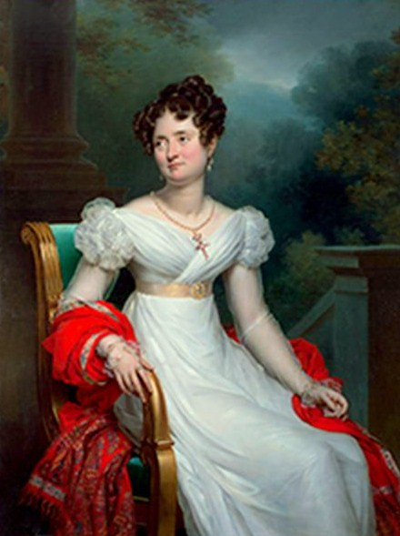 Zéphyrine Olympe de Choiseul Gouffi er Comtesse de Moreton Chabrillan (1782-1828)